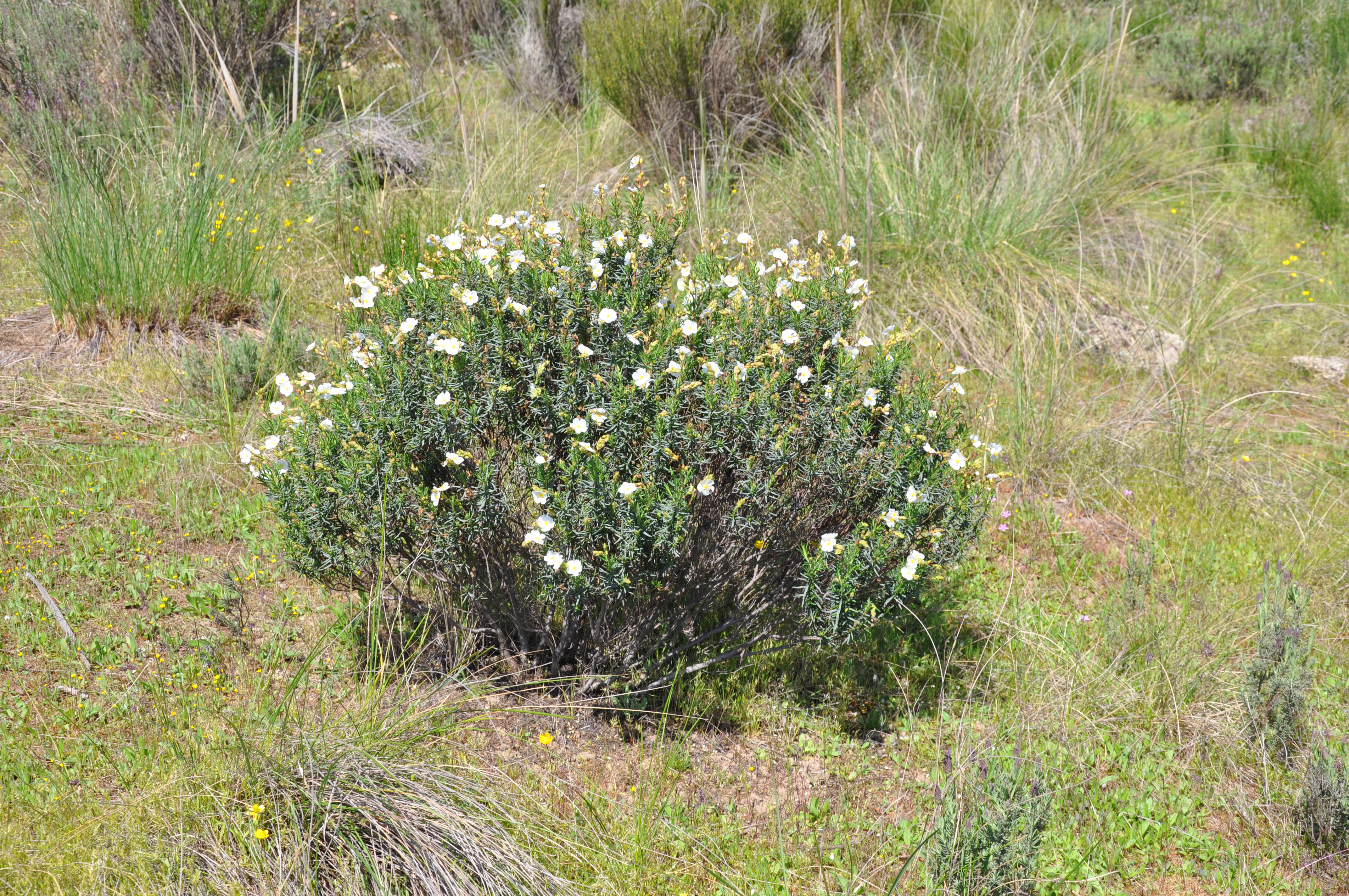 Chujarra (Halimium umbellatum), Miranda de Duero, Portugal.